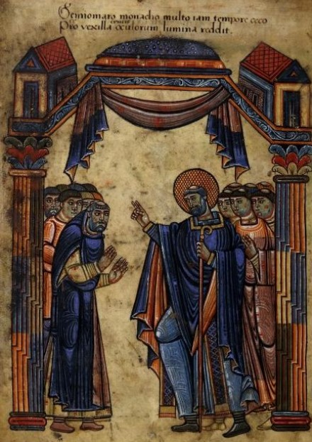 Saint Aubin guérissant un moine aveugle